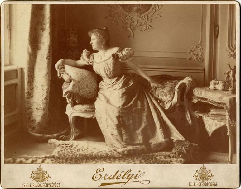 Emmer Kornélné Langheinrich Henrietta